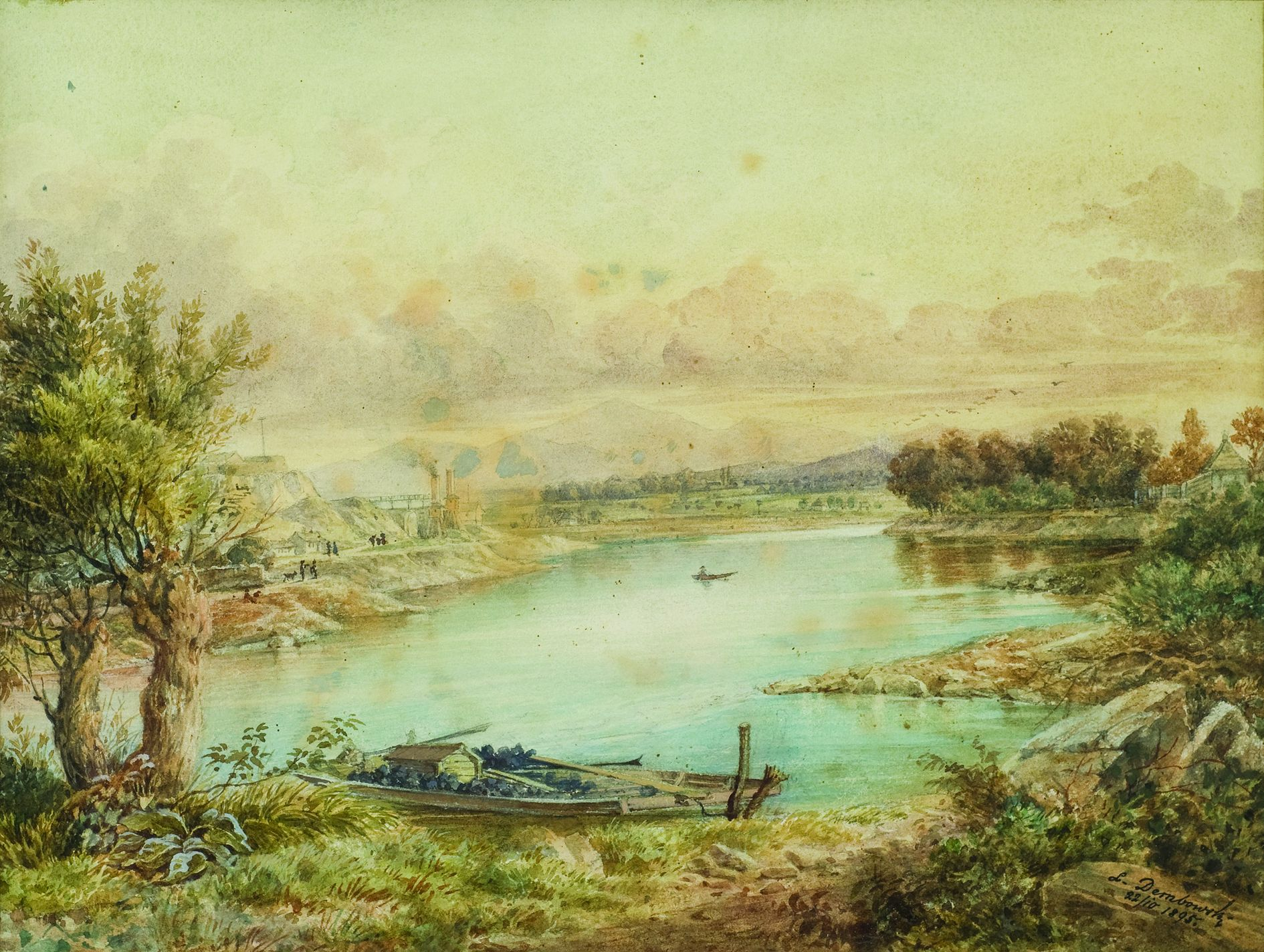 Leon DEMBOWSKI (1823-1904)/ Pejzaż z okolic Krakowa